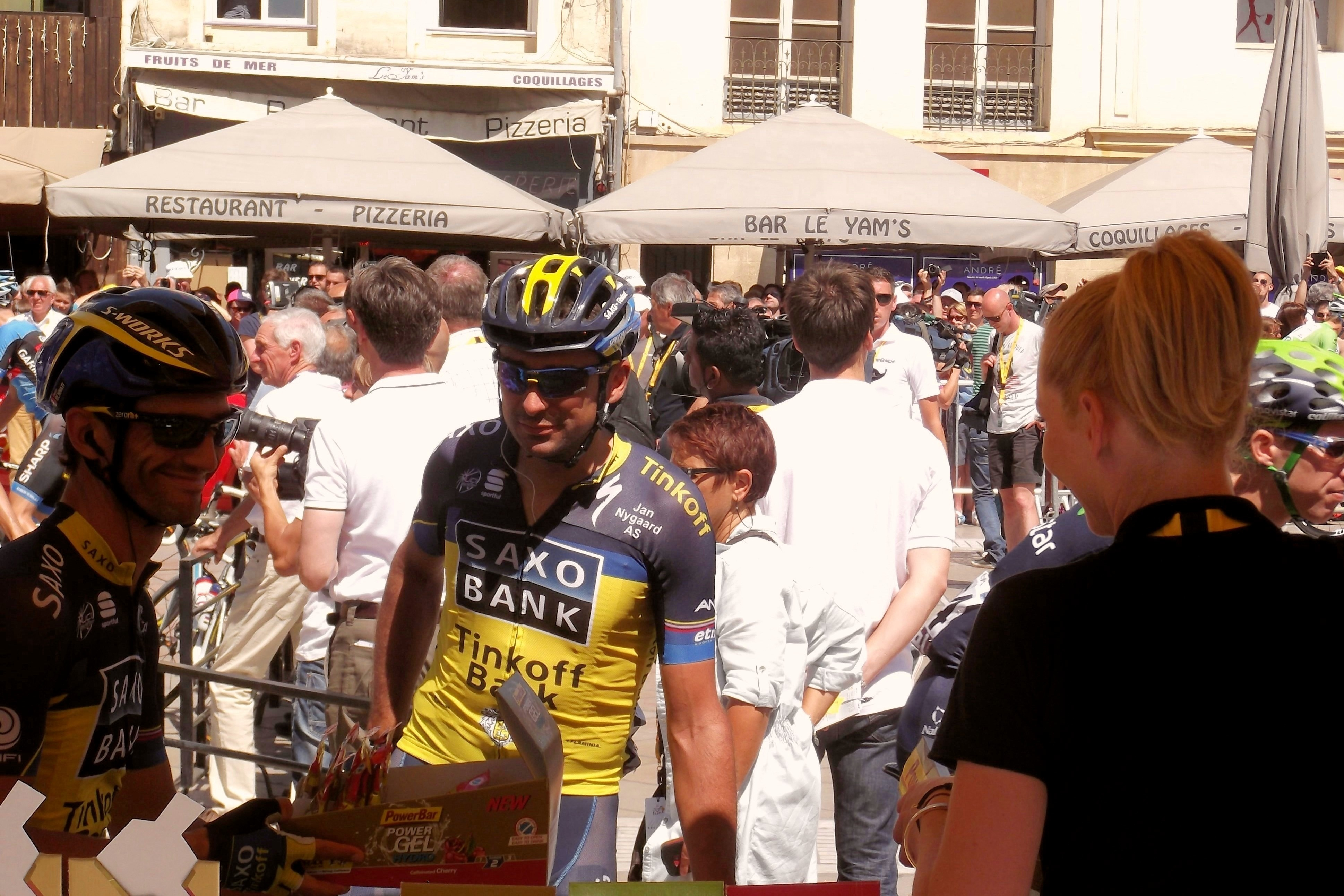 Distribution de barres énergétiques. Au centre, Benjamin Noval (dossard 95) et à gauche, Daniele Bennati.